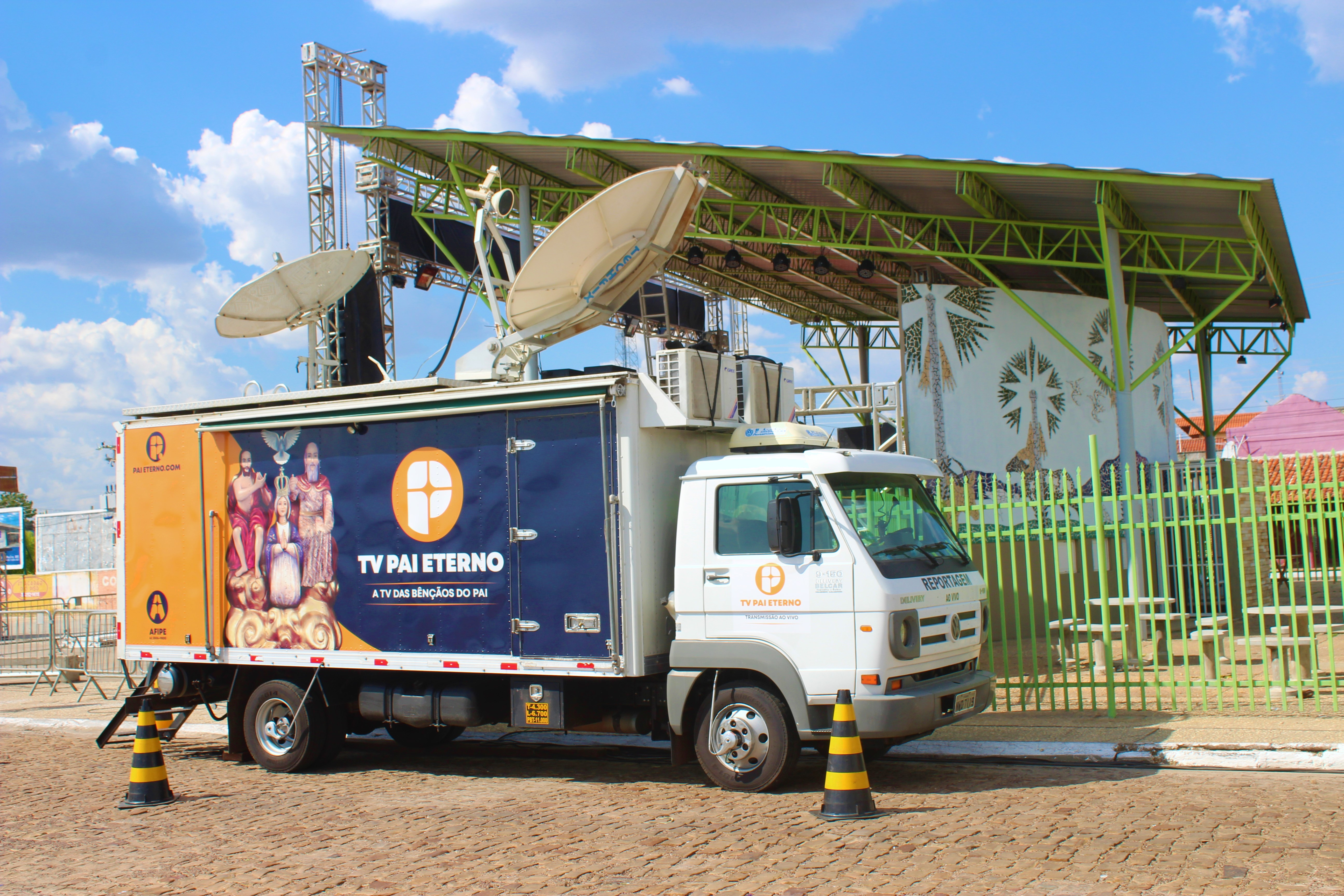 Caminhão VW da Tv Pai Eterno na praça de eventos de Campo Maior, Piauí.